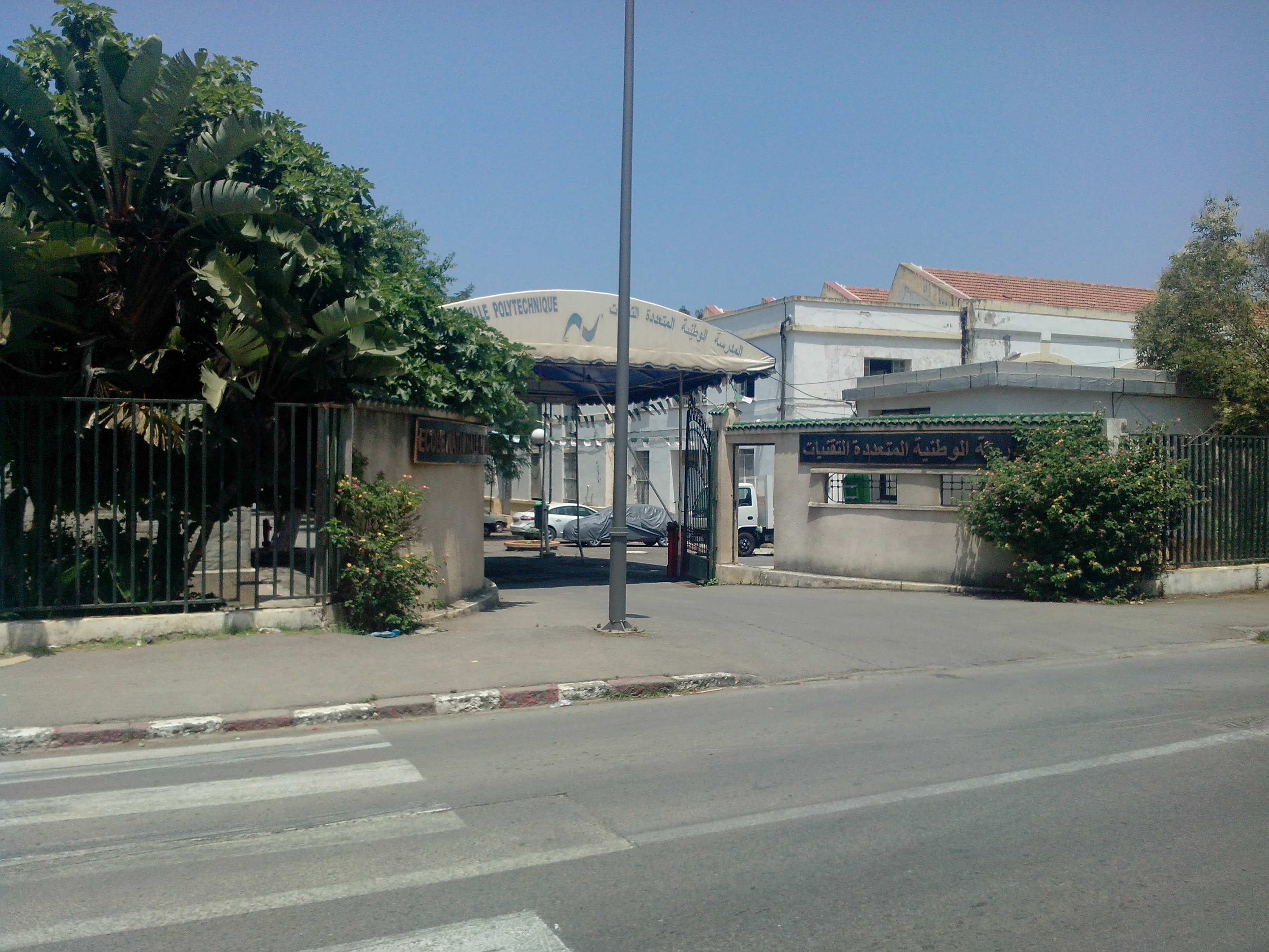 université polytechnique